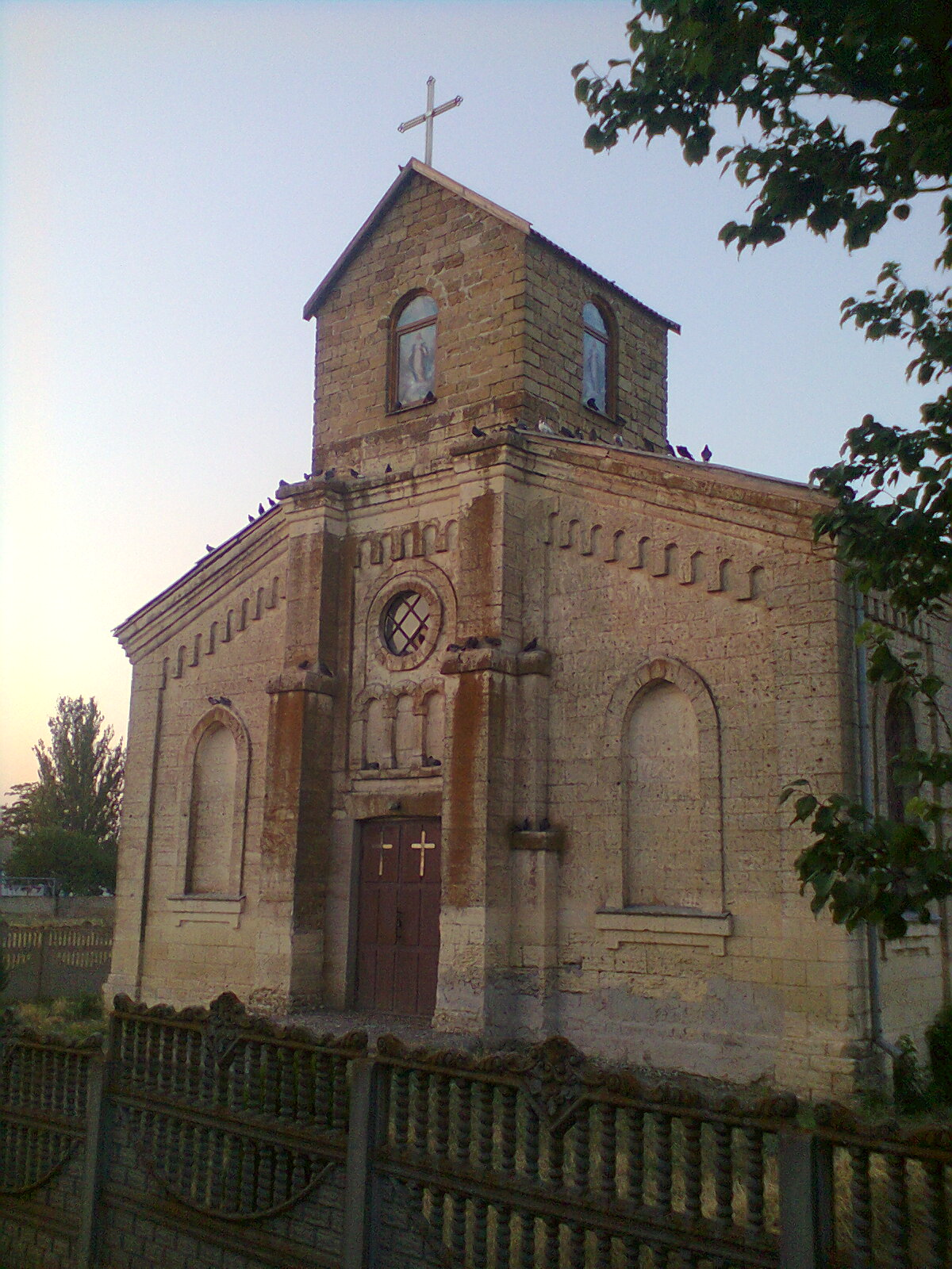 Костел Внебовзяття Пресвятої Діви Марії, знаходиться в селі Новопетрівка, побудовано на початку 20 століття та відновлено на початку 21 століття.